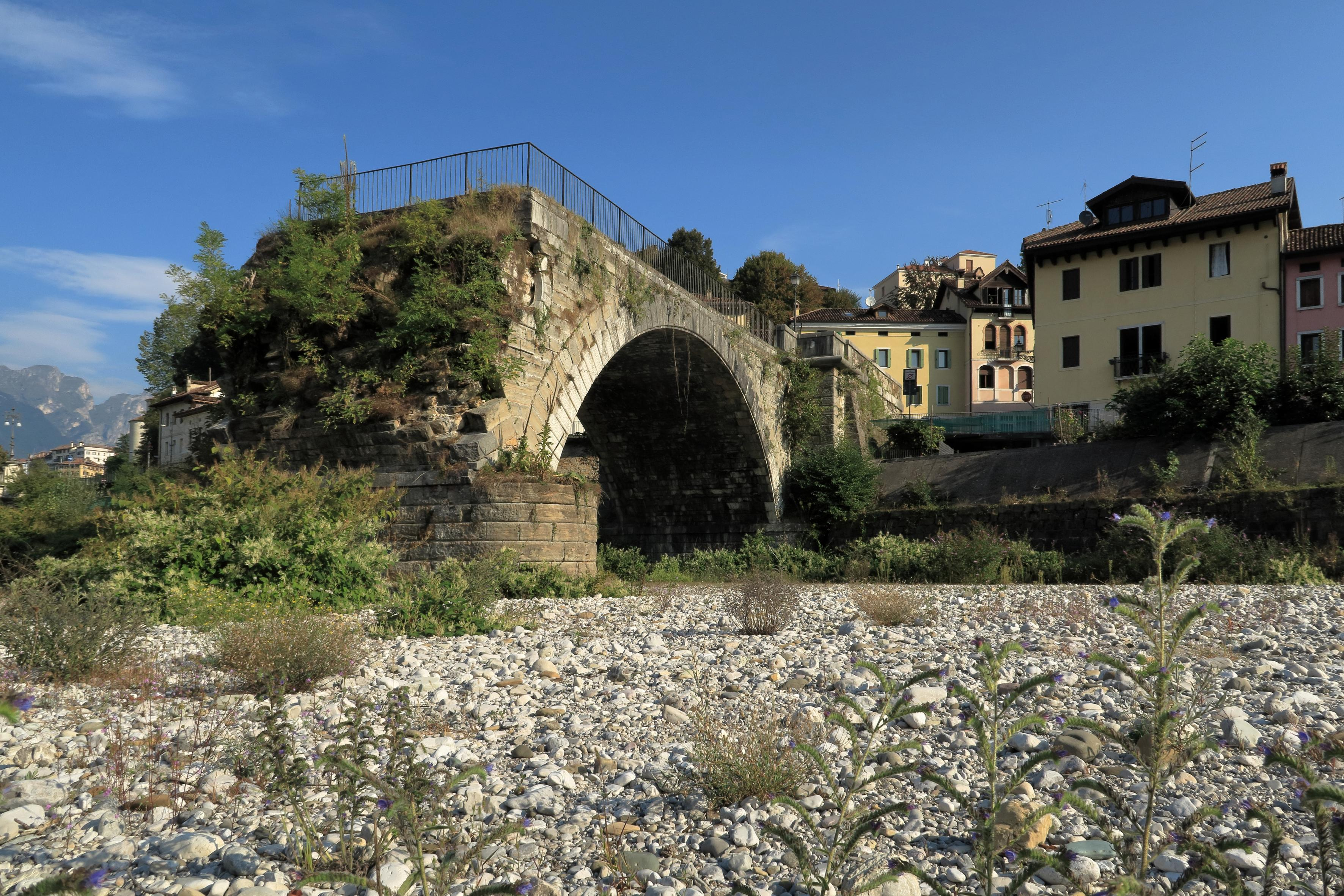 Ponte Vecchio visto da sud This is a photo of a monument which is part of cultural heritage of Italy.